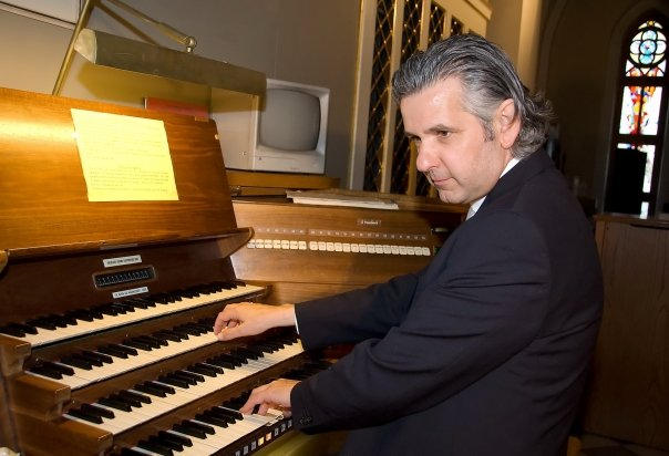 Aart Bergwerff (Nederland)